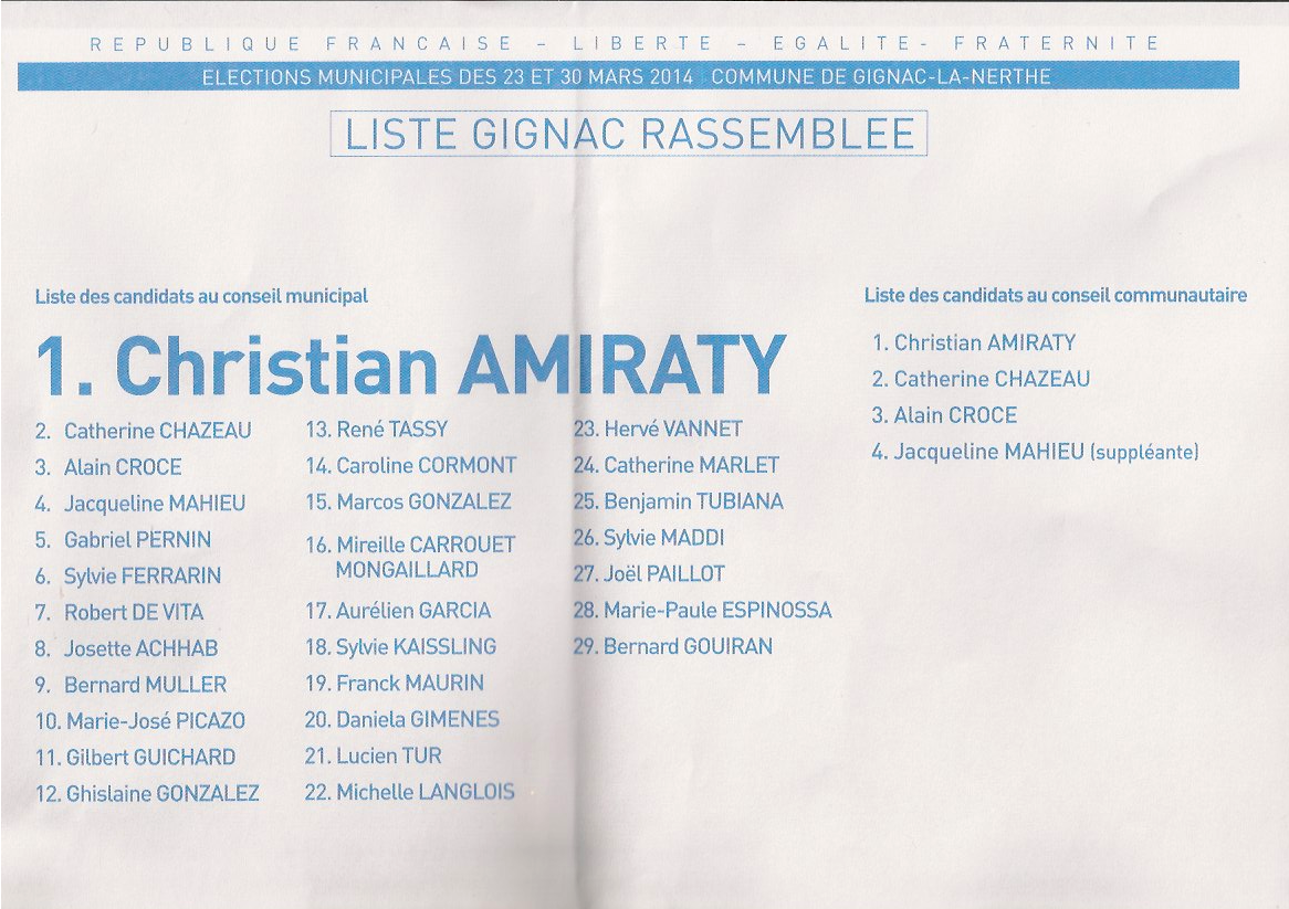 Bulletin de vote pour les élections municipales et communautaires françaises de 2014